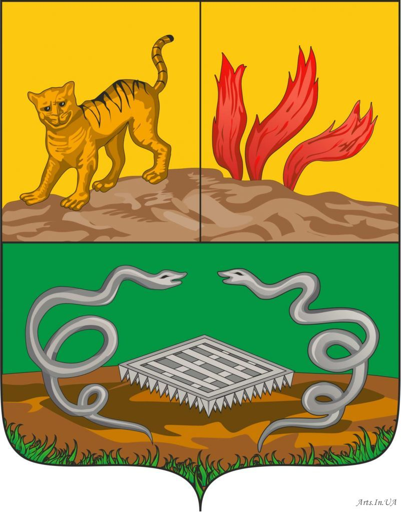 Официальный герб города Ленкорань ссылается на официальный сайт Президентской библиотеки АР [1],[2]